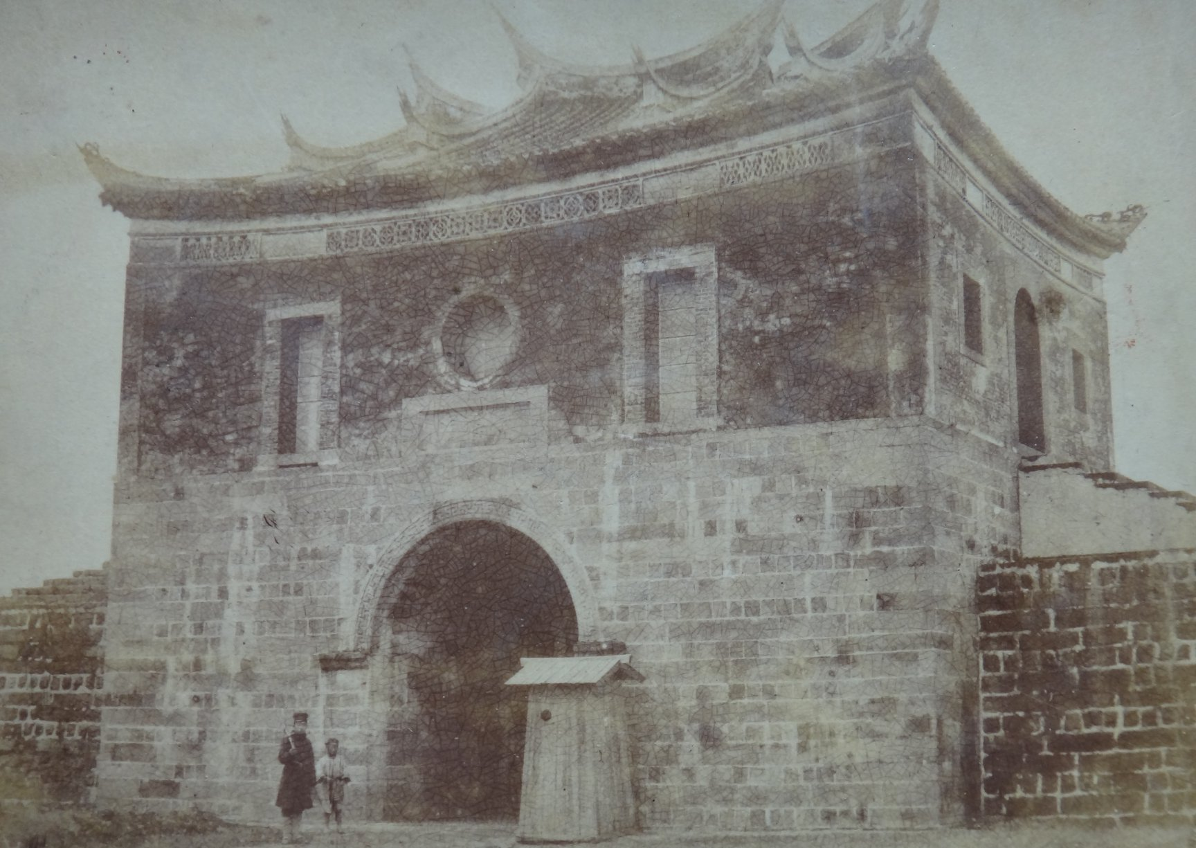 臺北府城東門。